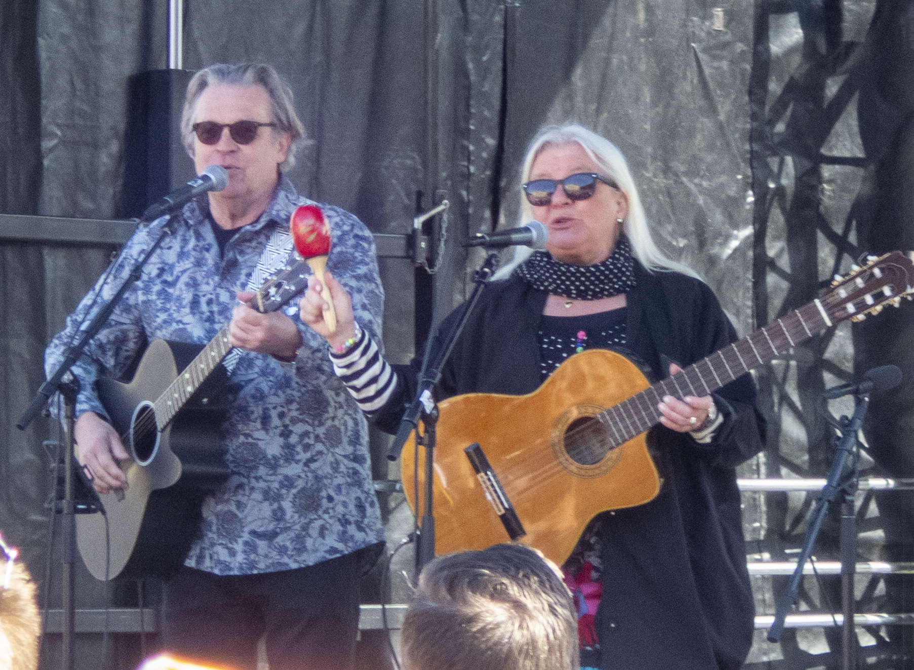 Peter Wanngren och Kerstin Anderby på Stora Torget i Karlstad under Påskparaden